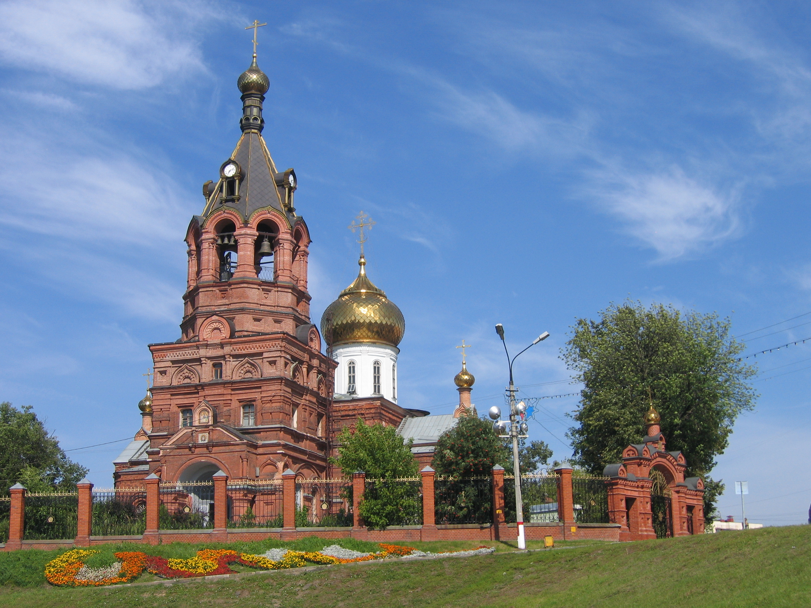 Kathedrale der Dreifaltigkeit in Ramenskoje, Russland